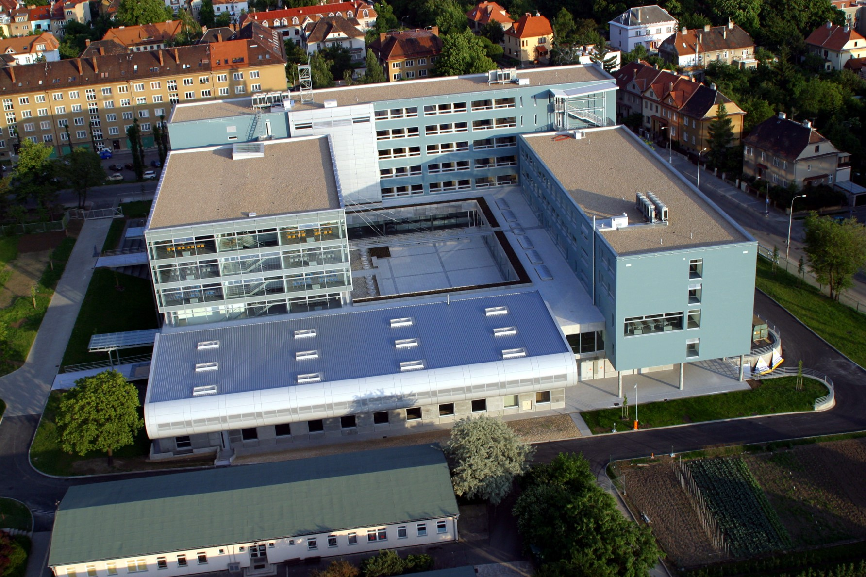 Letecký snímek budovy v areálu Mendelovy univerzity v Brně - Zemědělská 1.